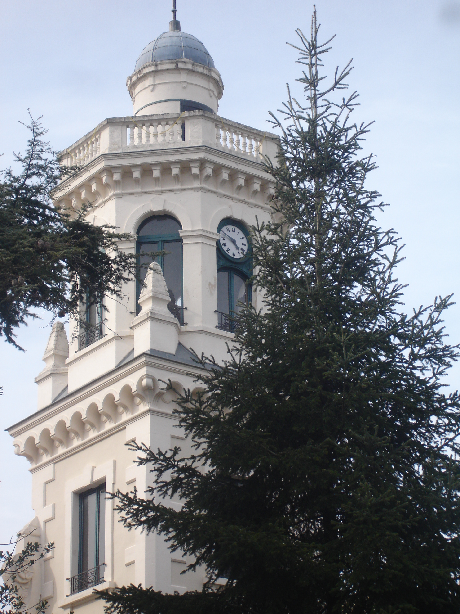 Irigny (69) : maison de la fondation Dorothée-Petit